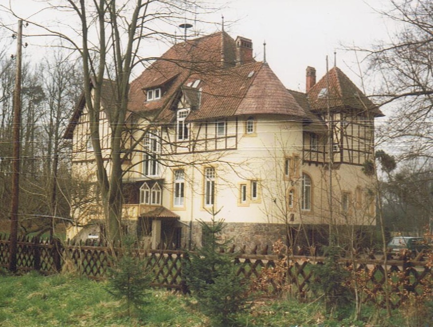 Ehemaliges Gutshaus der Familie von der Wense, heute Sitz des Bundesforstamtes. 1907 von Hilmer von der Wense (1864–1928), einem studierten Forstwirt und Rechtswissenschaftler, erbaut.